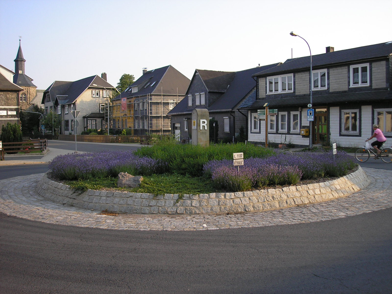 Der Dorfplatz in Neustadt am Rennsteig (Thüringen)